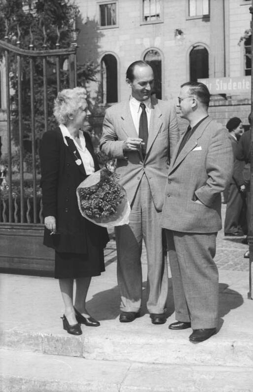 ADN-ZB/Archiv 1.9.1950 v.l.n.r.: Frau Engel (Kulturbund), Prof. Dr. Robert Havemann, Heinz Willmann, Generalsekretär des Deutschen Komitees der Kämpfer für den Frieden. 7765-50